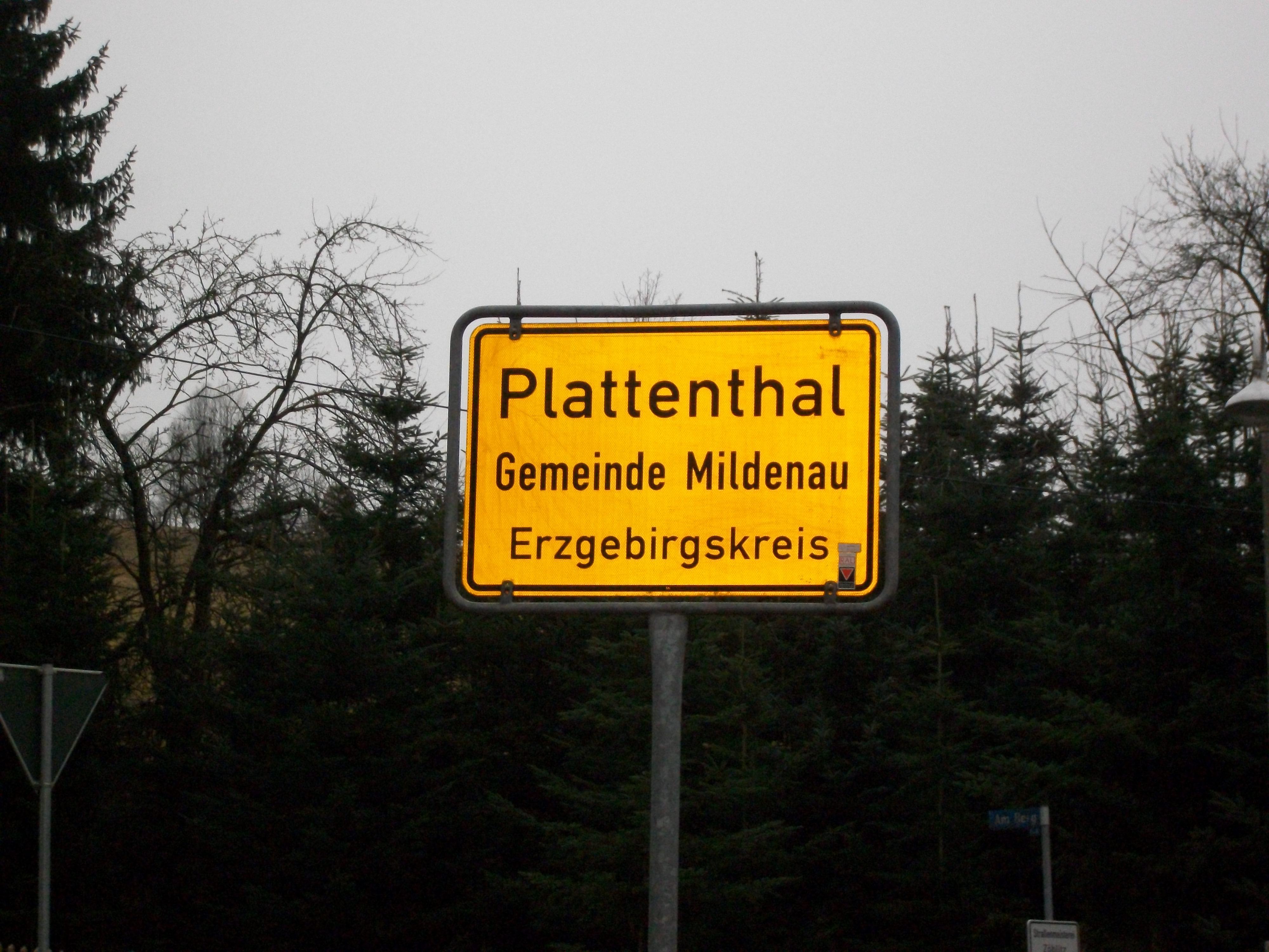 Ortseingangsschild Plattenthal, Gemeinde Mildenau